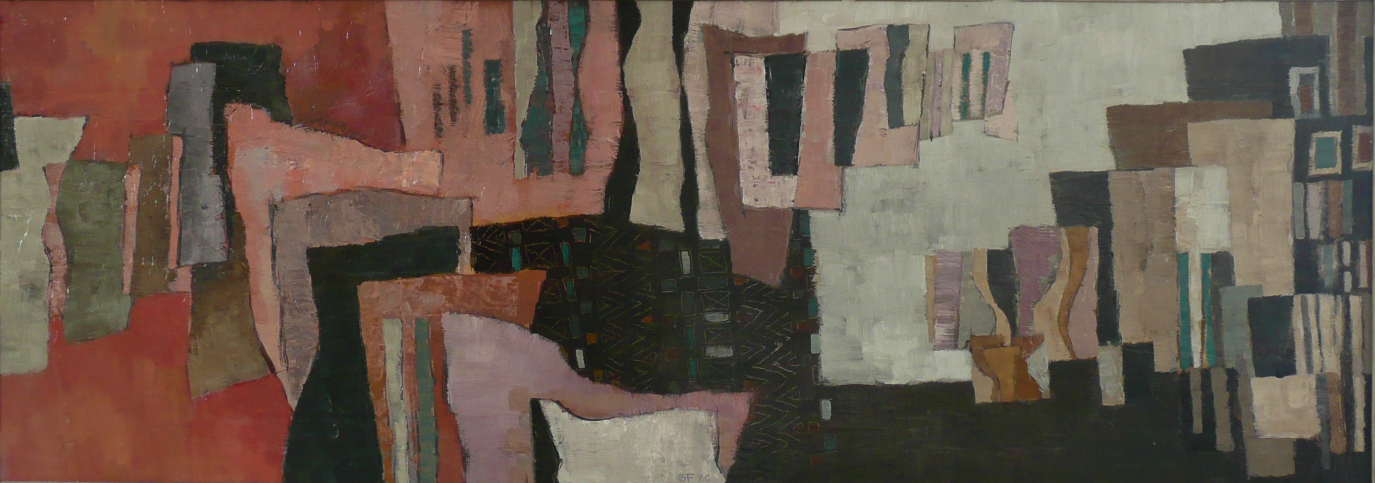 Simon Fuhrer, Komposition; Oel auf Pavatex; 37 x 101.3 cm